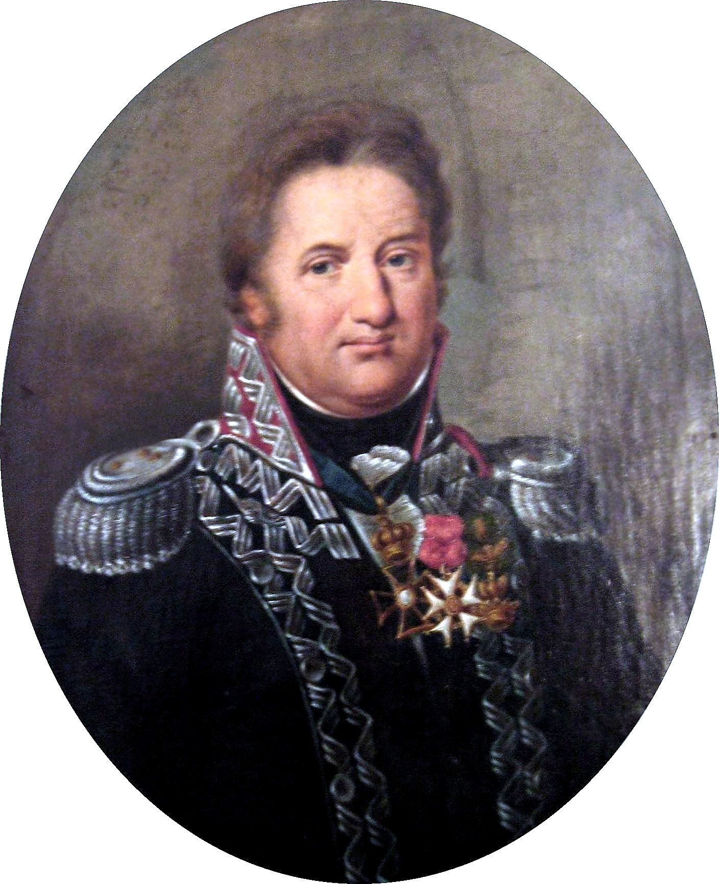 Jan Henryk Dąbrowski anonymous portrait before 1818 Image taken by User:Mathiasrex Maciej Szczepańczyk